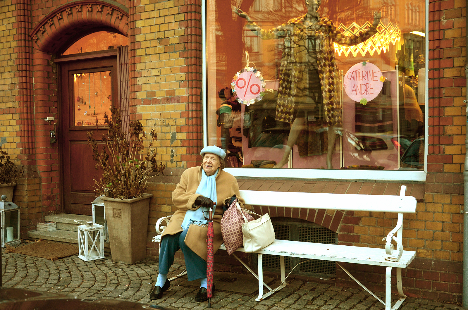 Diese freundliche Dame, die am Winterabend des 5. Januar 2017 hier auf einer privaten Bank auf den Bus wartete, gab nach anfänglichem Zögern ihr o.K. zur Veröffentlichung dieses Fotos in den Wikipedia-Artikel zum Wedekindplatz in Hannover und bedankte sich für die ehrenamtliche Arbeit ...